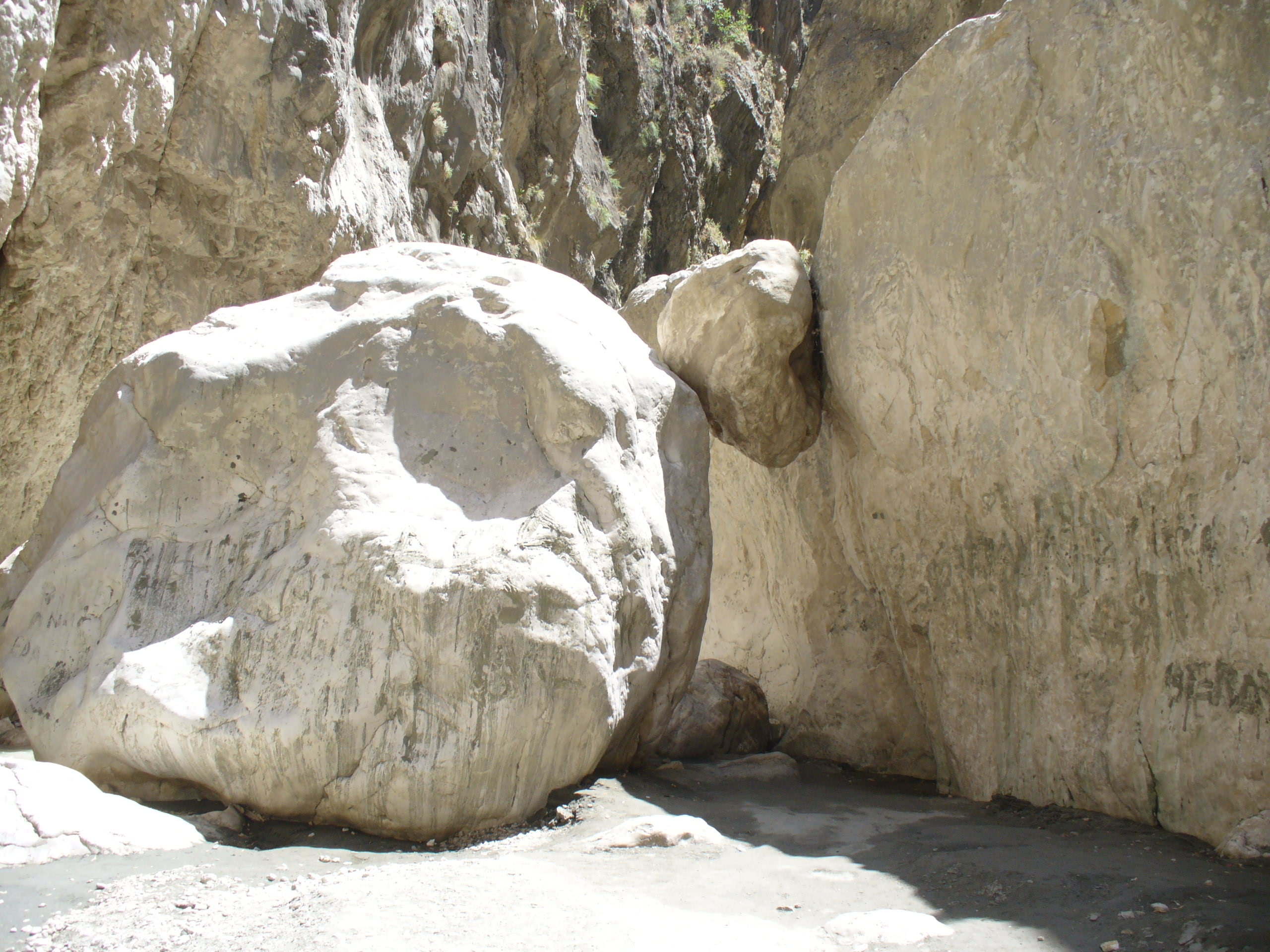 Saklıkent, Fethiye, Muğla Photo taken in Saklikent gorge in 2006 by Jedyooo